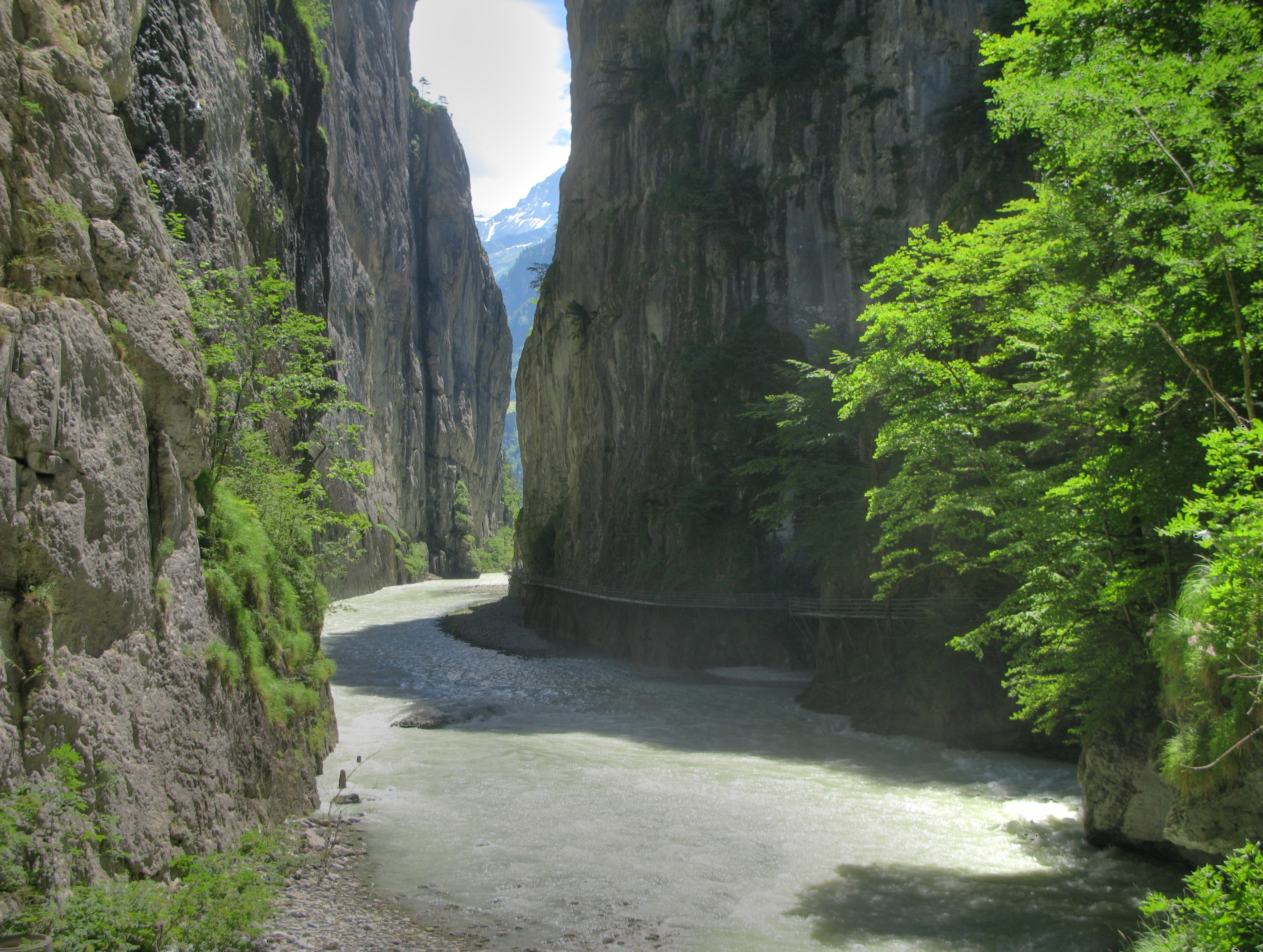 Aareschlucht (Aar gorge) near Meiringen